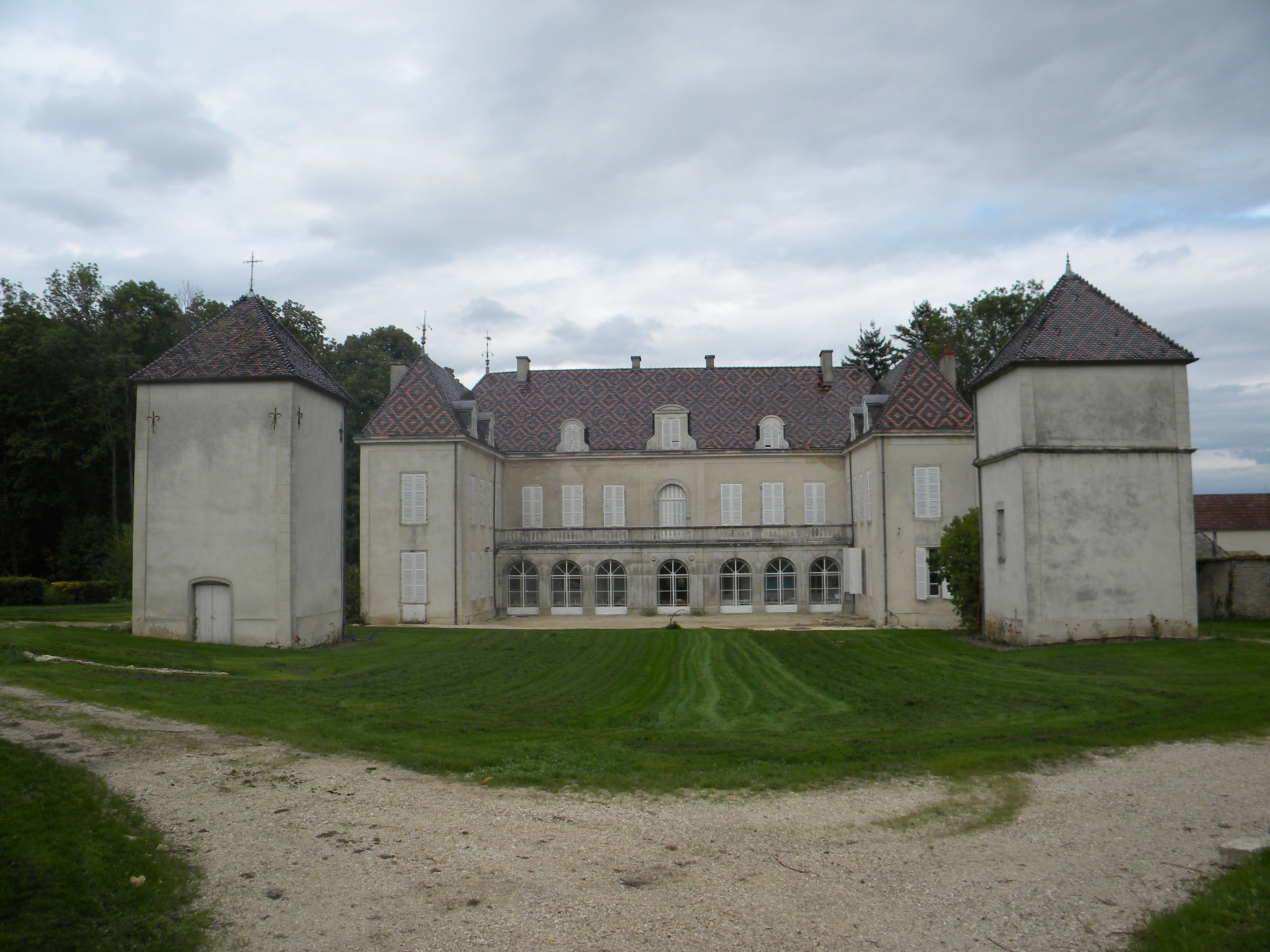 Kastelo en Collonges-lès-Bévy